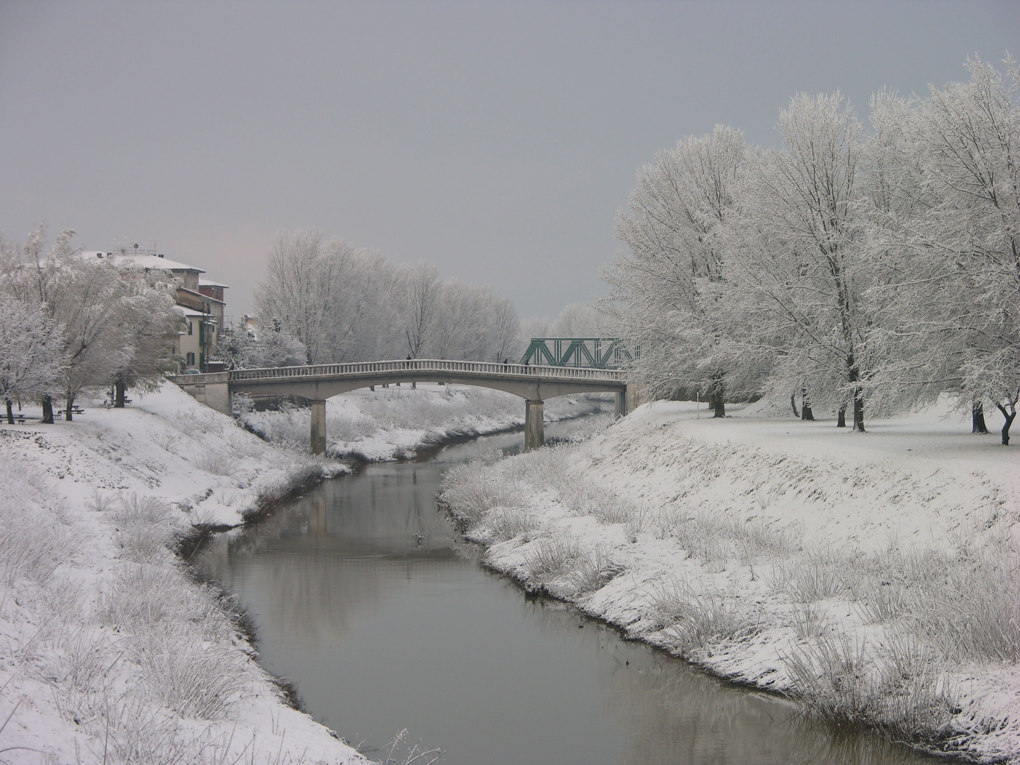 Pontedera: fiume Era e Ponte Napoleonico, nevicata Dicemmbre 2005.jpg